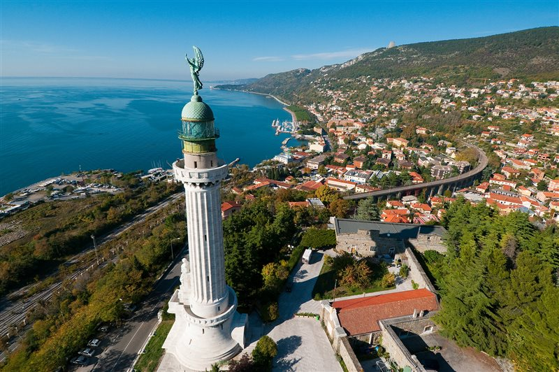 Faro della Vittoria e golfo di Trieste